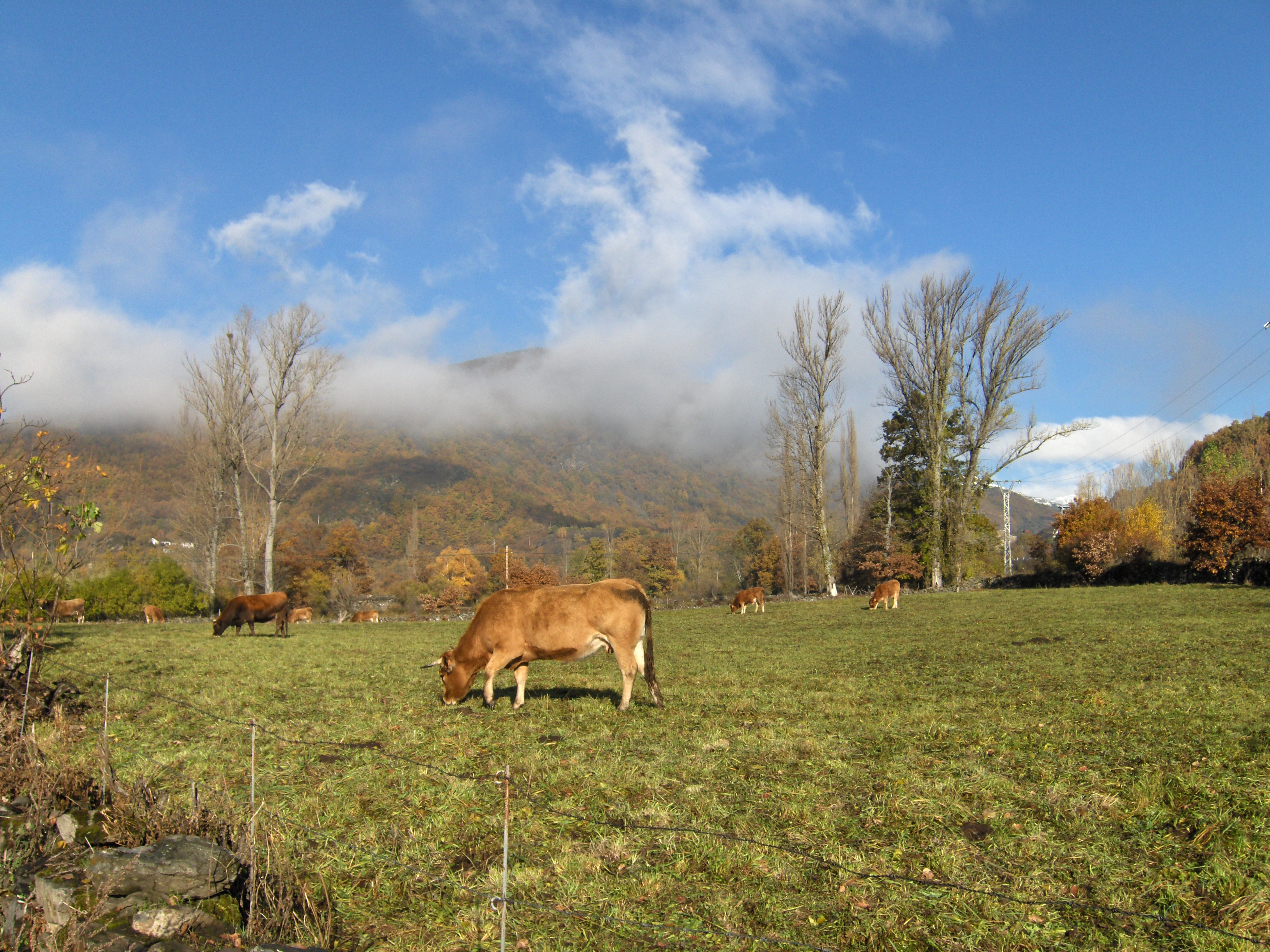 Valle de Laciana en otoño